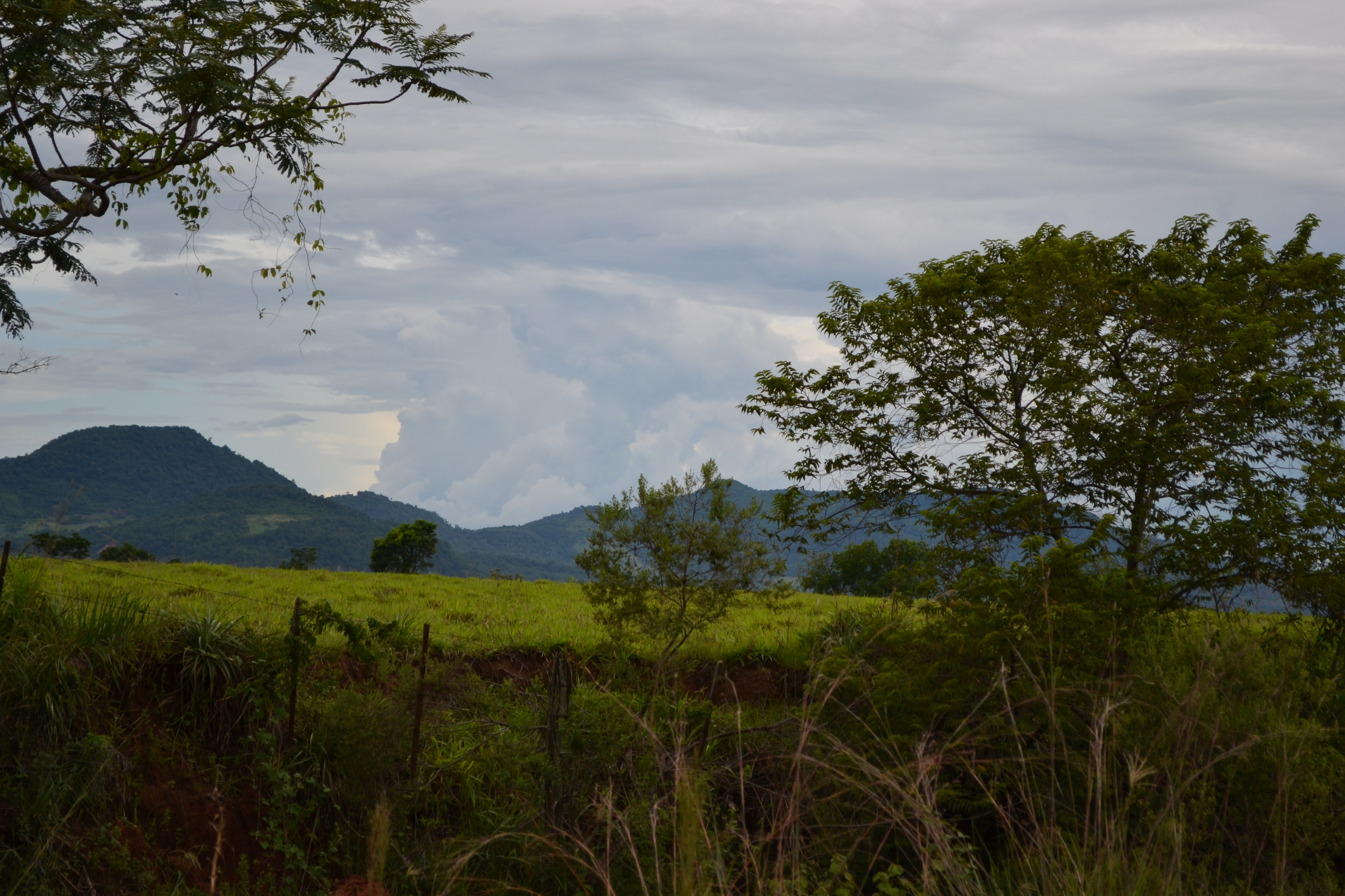 Cordillera del Ybytyruzú cerca de Villarrica